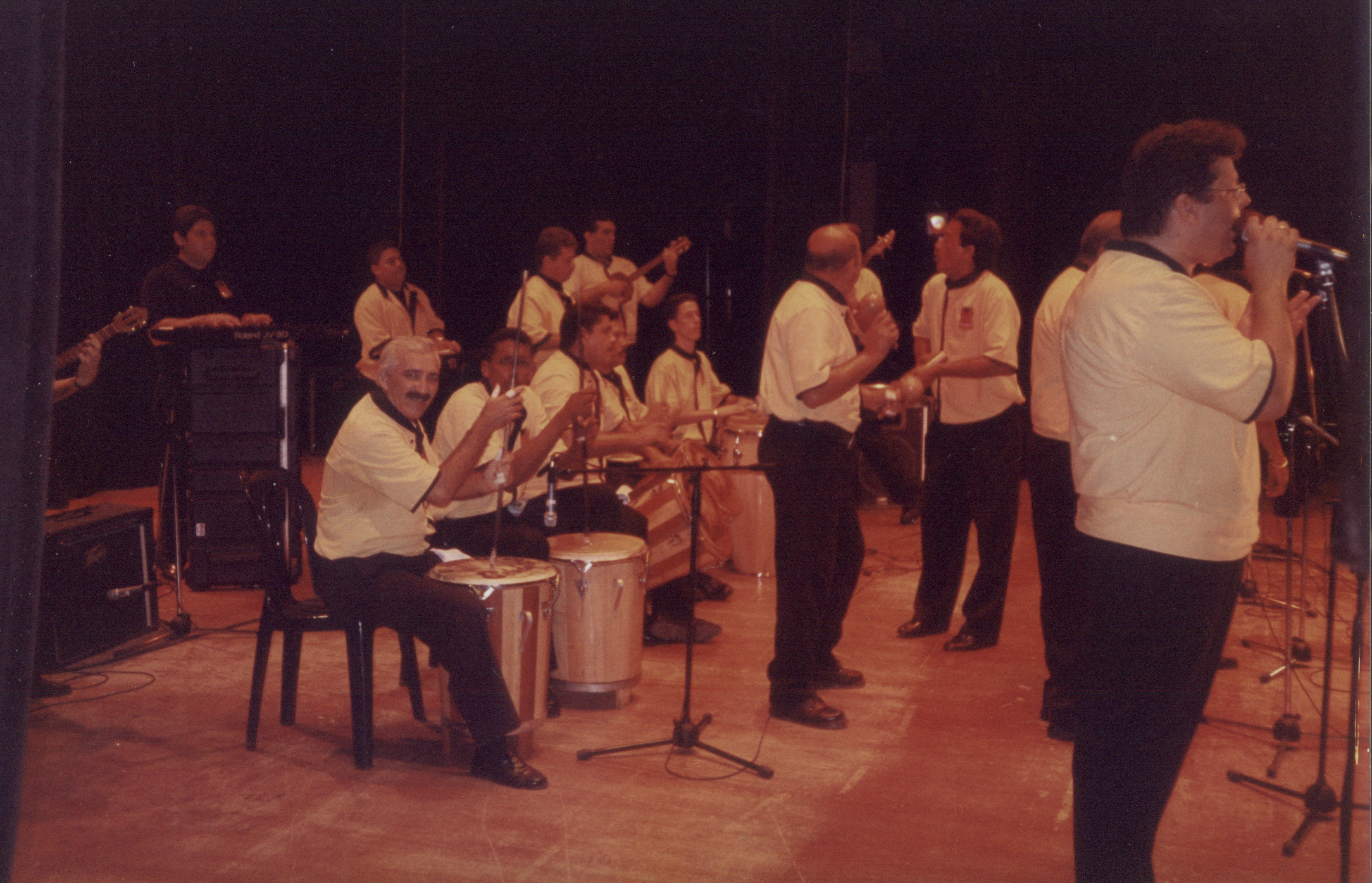 Actuación de Saladillo de Nerio Matheus en el Reencuentro Saladillero en el Teatro Baralt